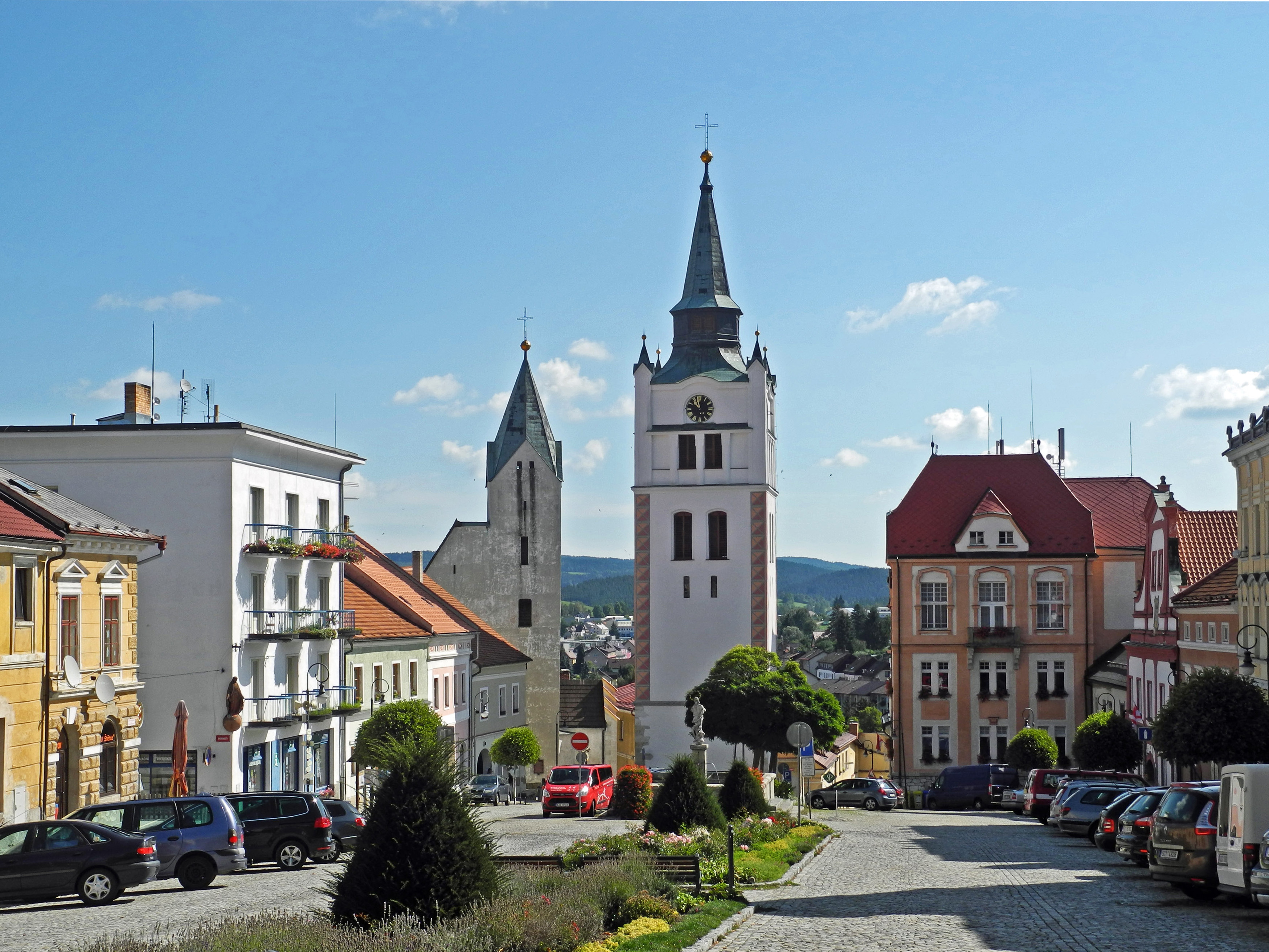 Bürgerhäuser am Markt in Winterberg (Vimperk) im Böhmerwald